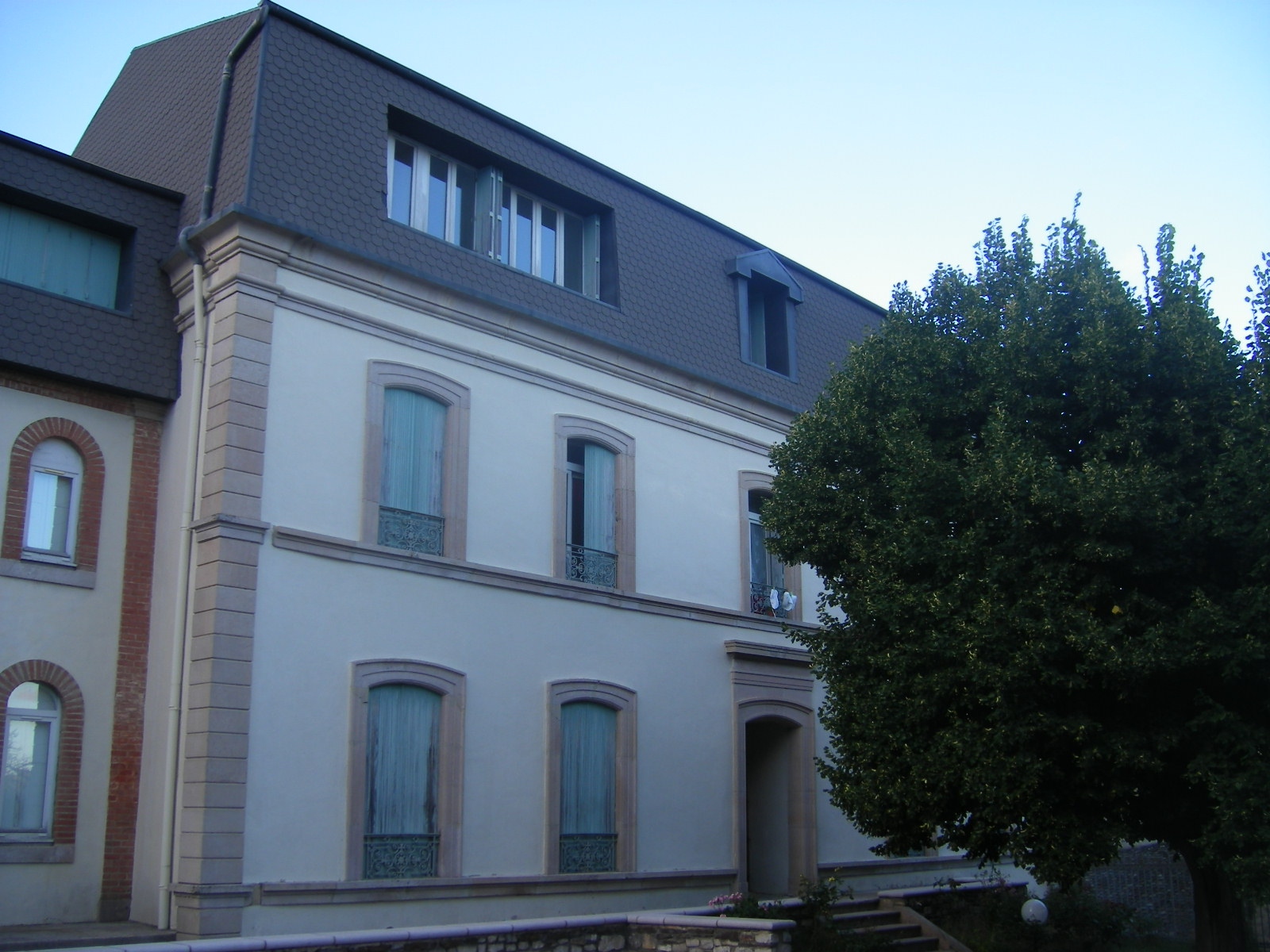 Le Pompidou - municipalité